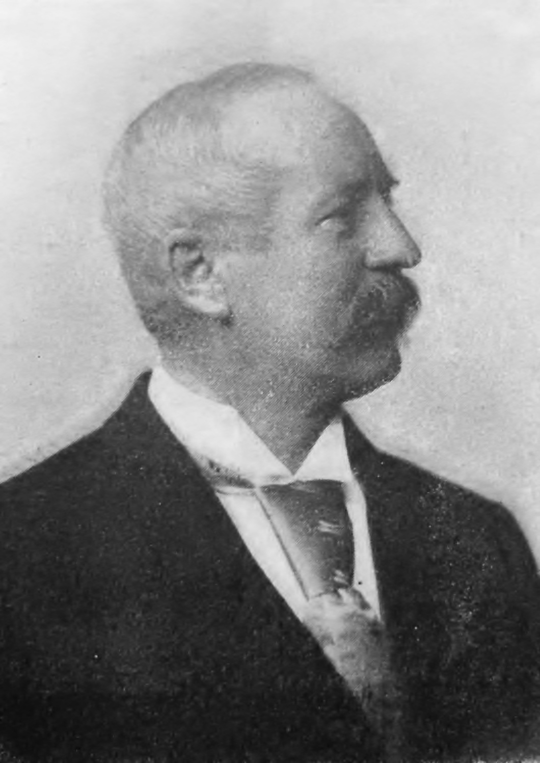 Portrét Hermann_von_Lucanus